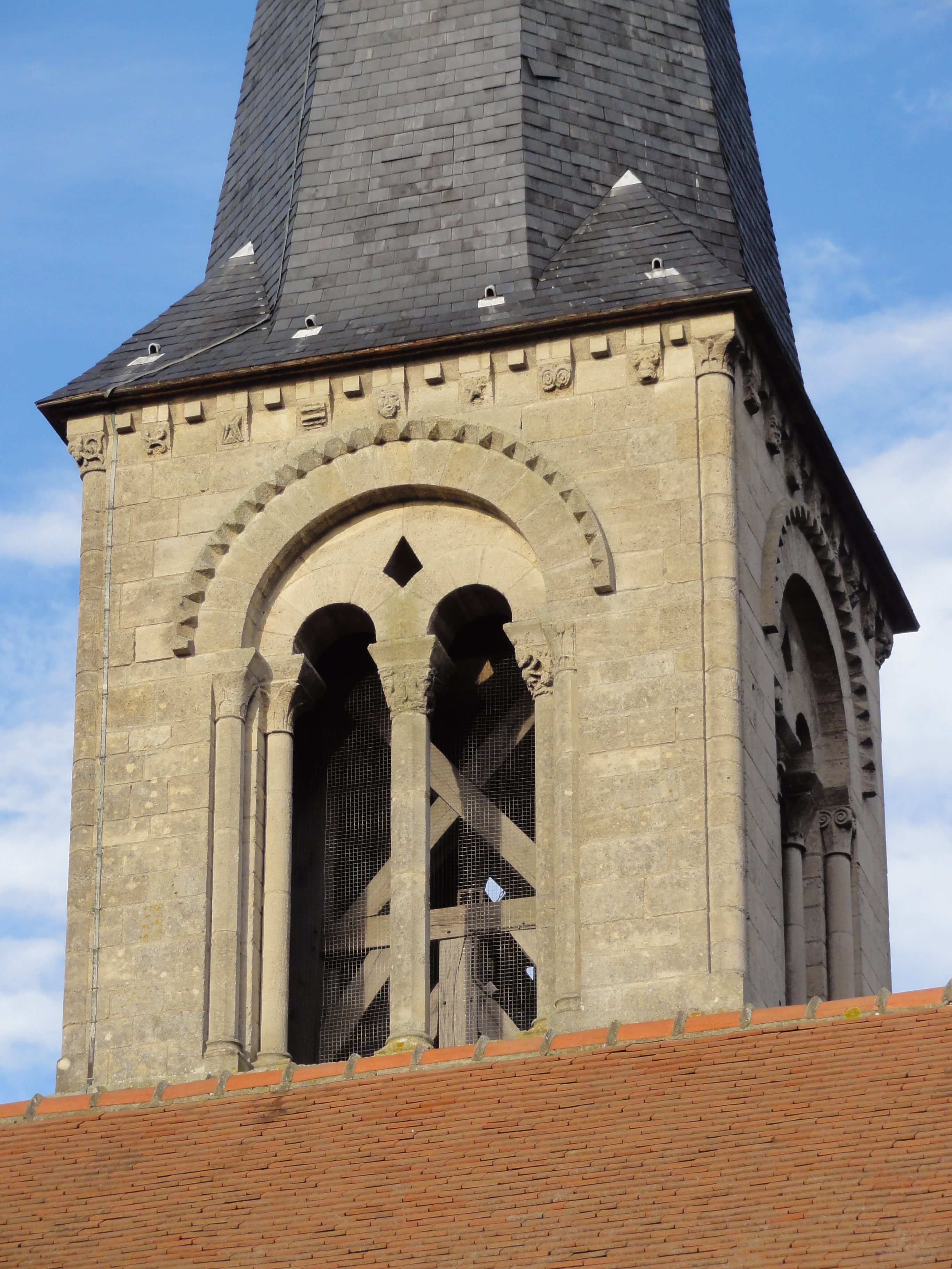 Clocher, 3e étage (reconstruction après la Seconde Guerre mondiale), côté sud.